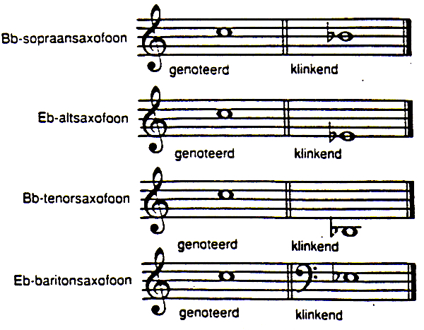 sax-transposition table